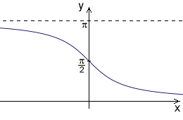 Graf funkce arkus kontagens.